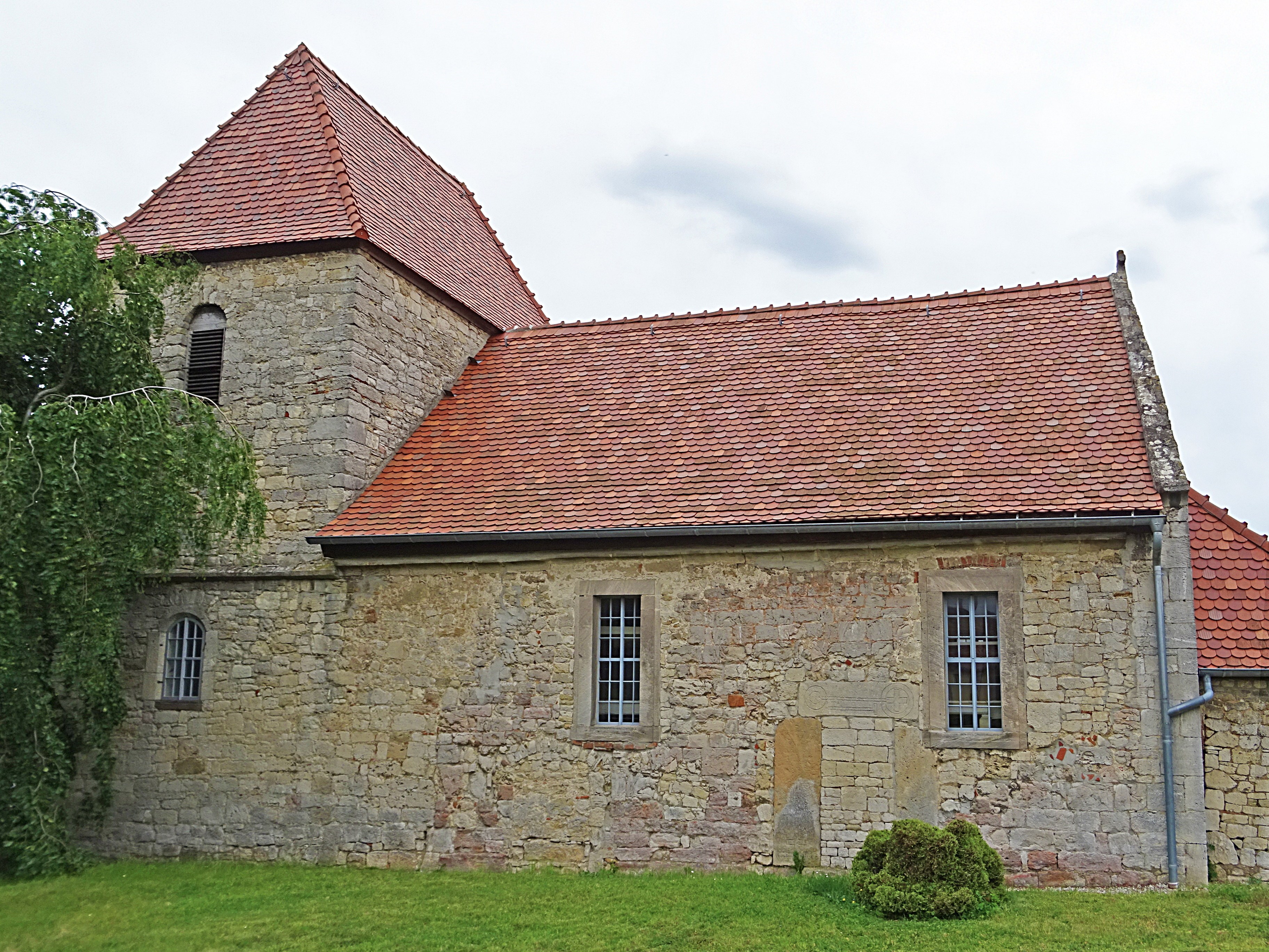 Dorfkirche Großwilsdorf von Norden